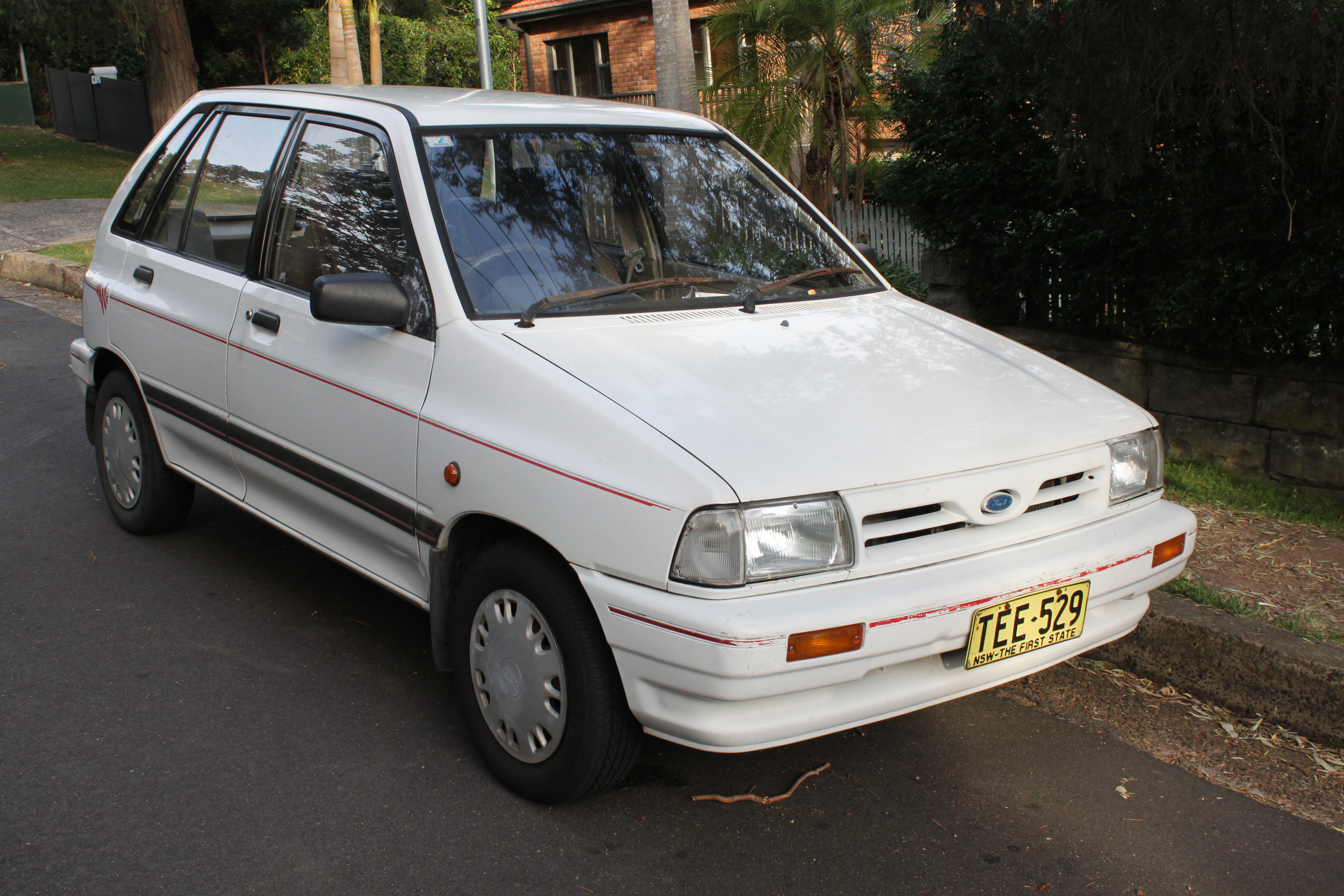 Ford Festiva WA